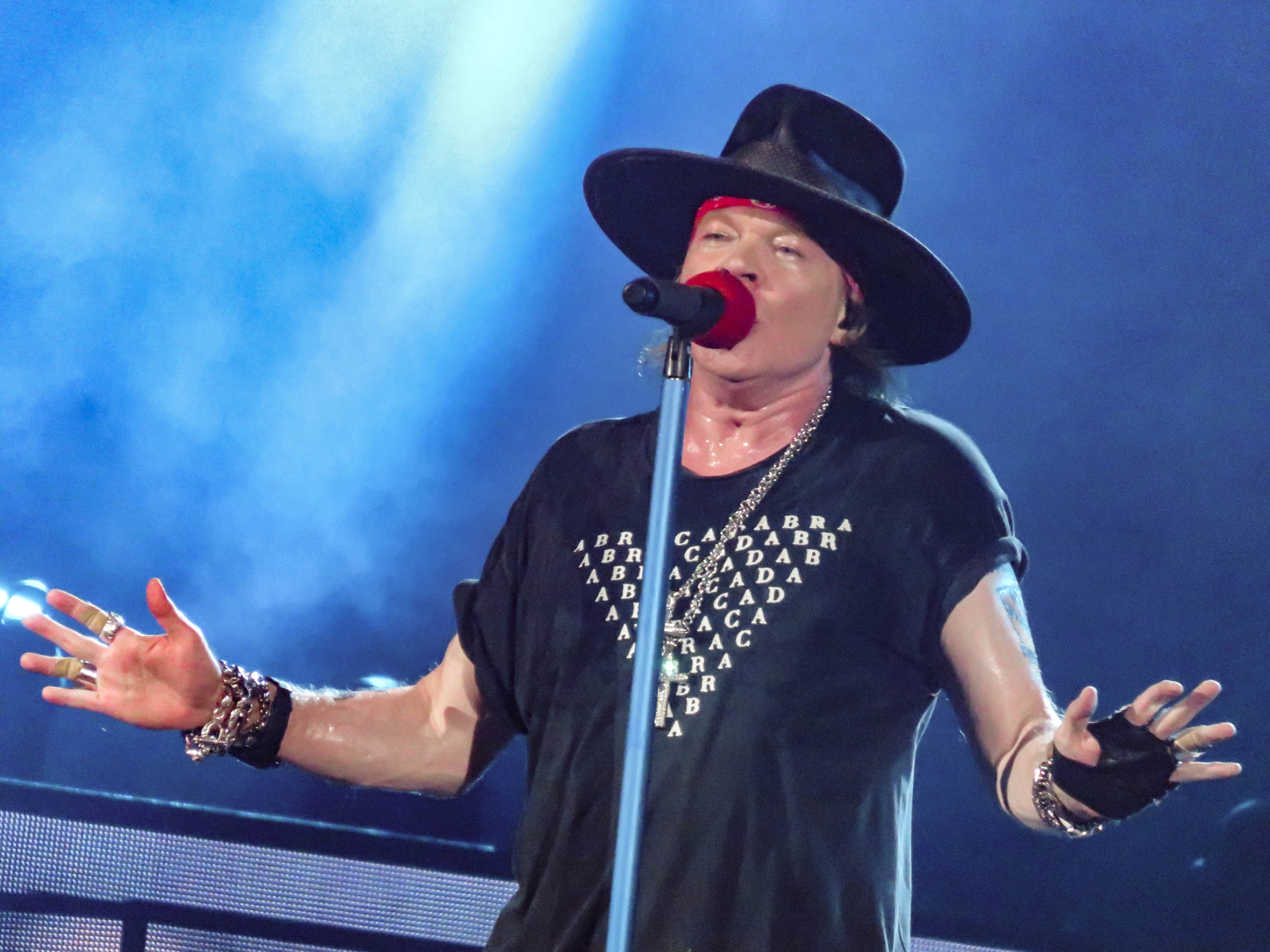 Guns n´Roses Palacio de los Deportes 30/11/2016